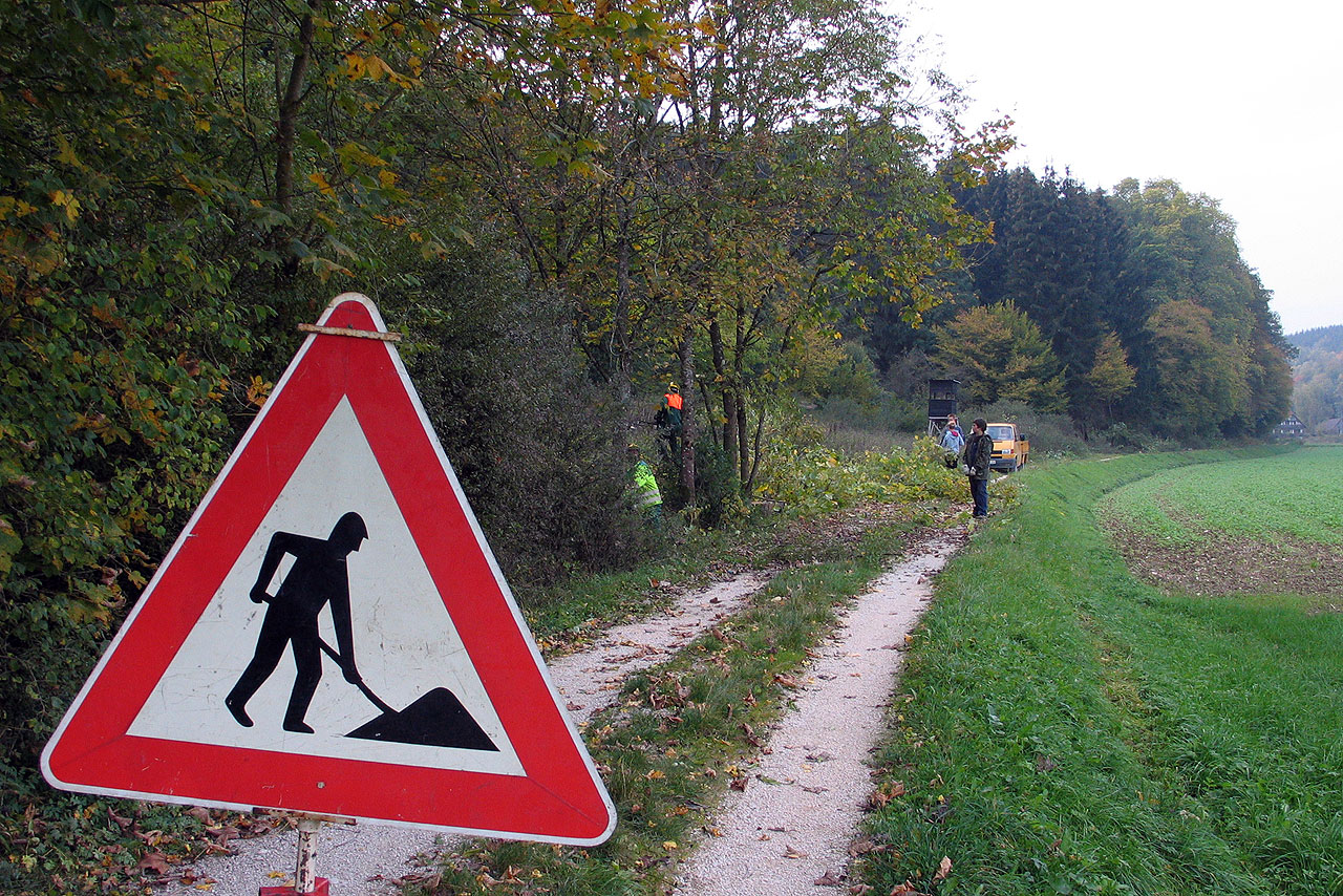 Rodungsarbeiten zum Weiterbau der Strecke von der Sägmühle nach Katzenstein.